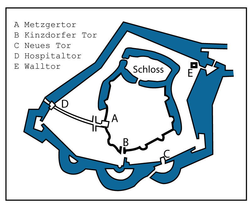 Skizzenkarte der erweiterten Hanauer Altstadt und Befestigung um 1550